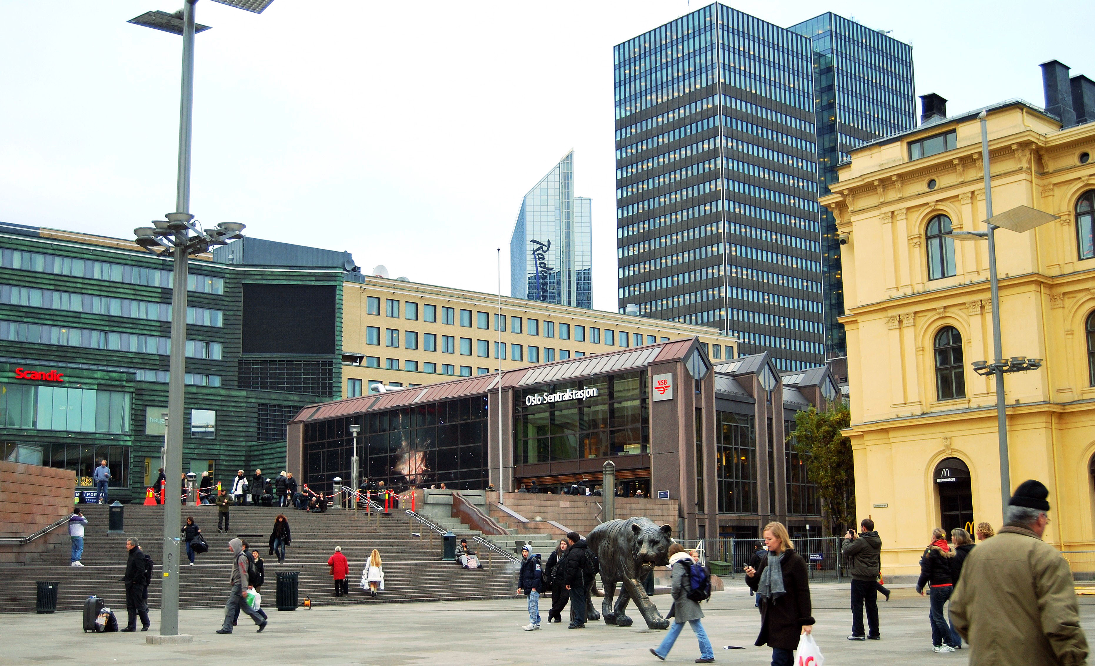 Oslo Sentralstasjon 2009 r.